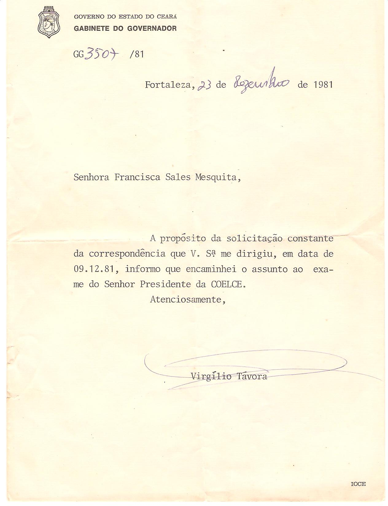 Essa carta foi enviada por Vigilio Tavora em resposta ao pedido de "Dona Fransquinha" para implantar sistema energia elétrica no bairro da caixa d´água